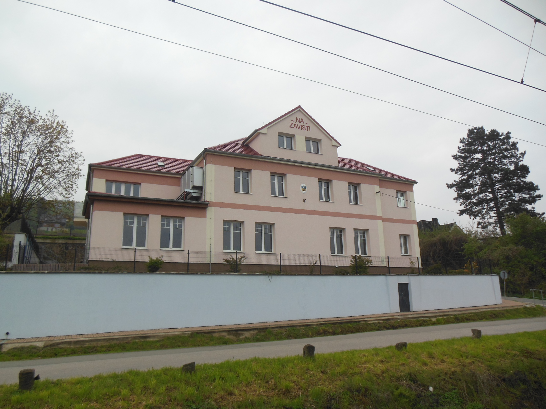 Všenory (okres Praha-západ). Obecní úřad č. p. 151 v ulici U Silnice, pohled z vlaku.